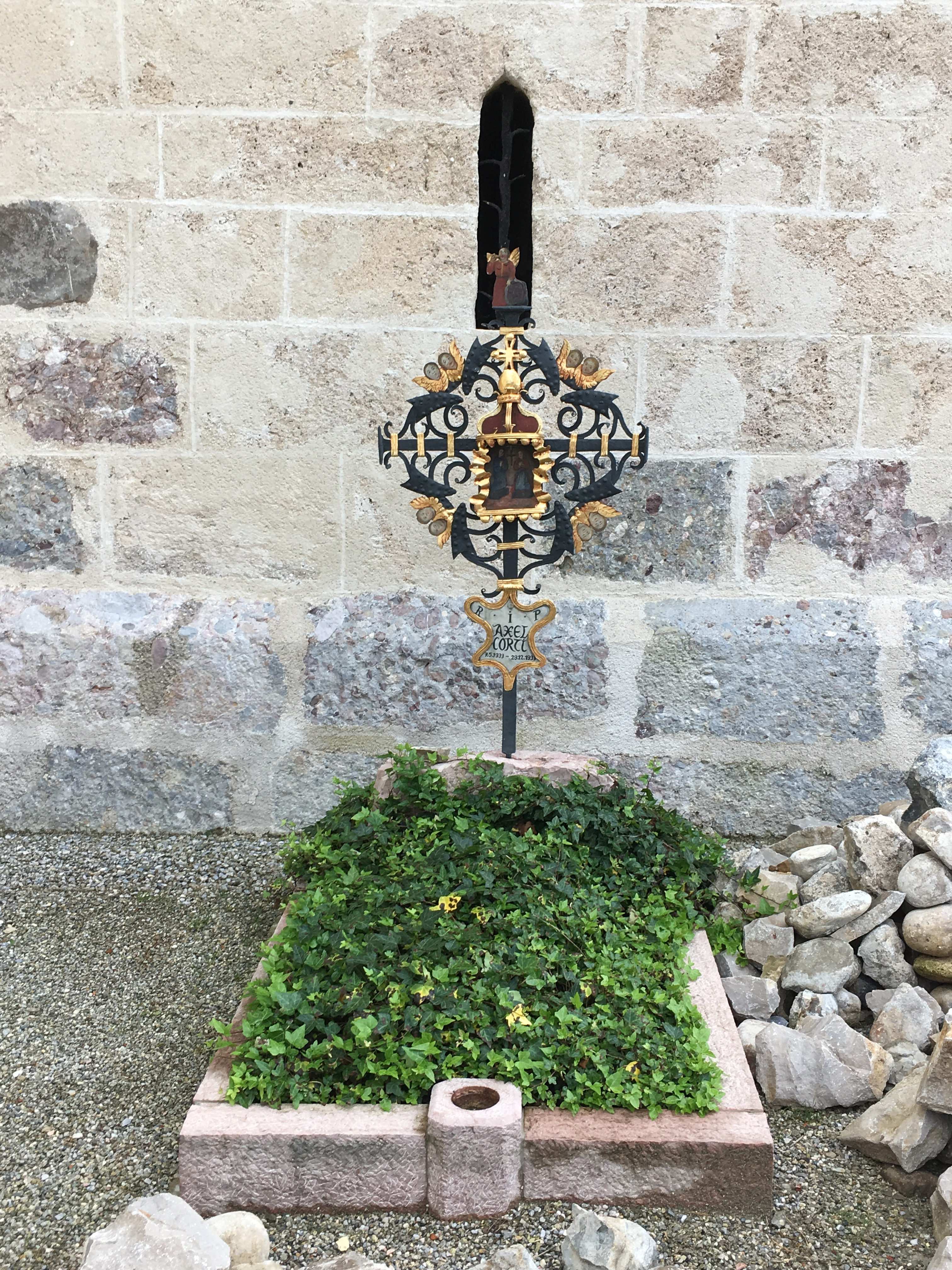 Arnsdorf (Gemeinde Lamprechtshausen, Bezirk Salzburg-Umgebung): Grab des Regisseurs Axel Corti im Arnsdorfer Friedhof bei der Wallfahrtskirche Maria im Mösl